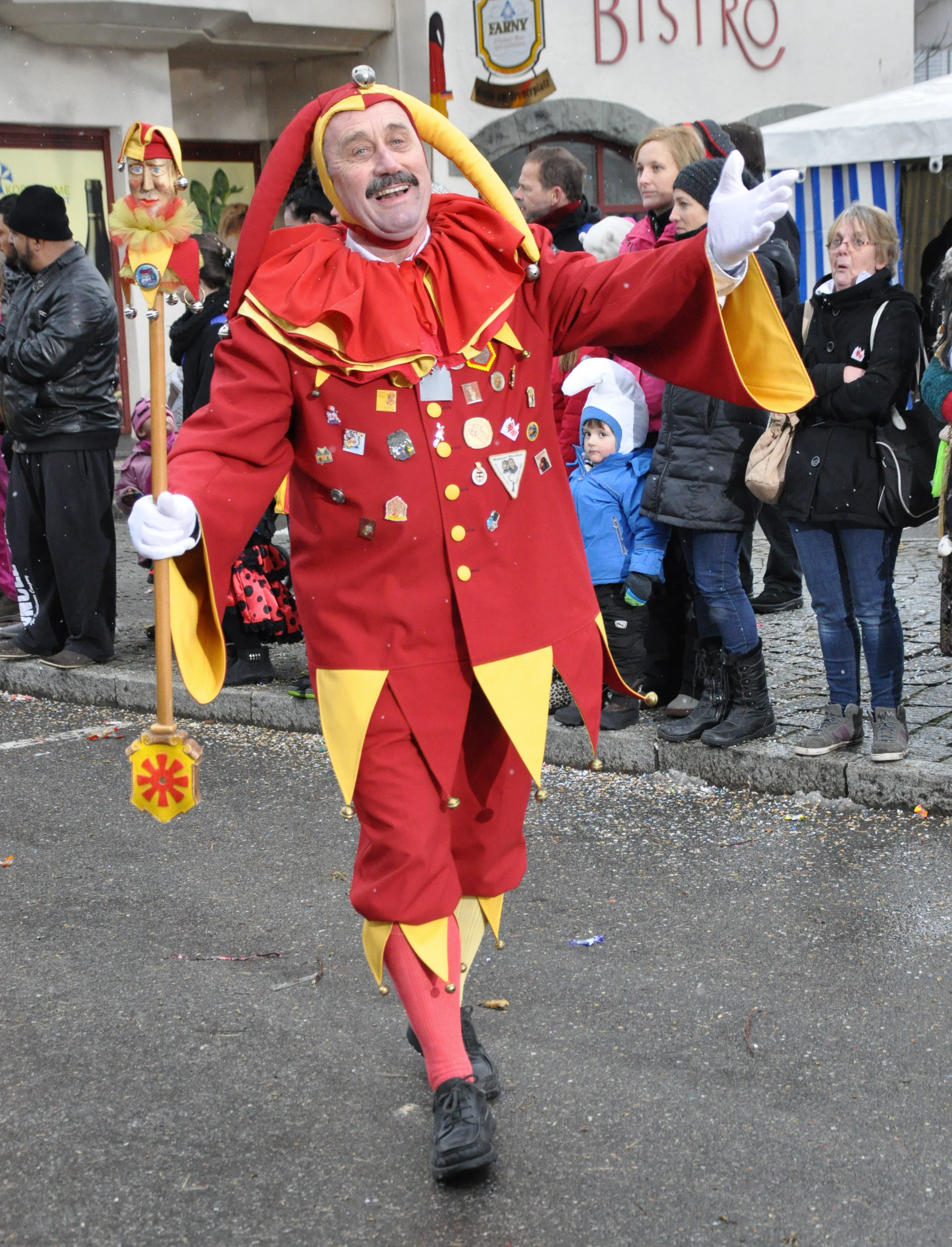 Historische Narrenzunft Markdorf; Narrenbüttel (in Markdorf kein Polizist, sondern ein Hofnarr; zusätzlich gibt es eine Narrenpolizei) Fotografiert beim Landschaftstreffen der Vereinigung Schwäbisch-Alemannischer Narrenzünfte (VSAN) 2015 in Weingarten; Narrensprung am Sonntag, 25. Januar 2015